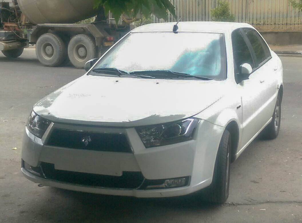 IKCO Dena